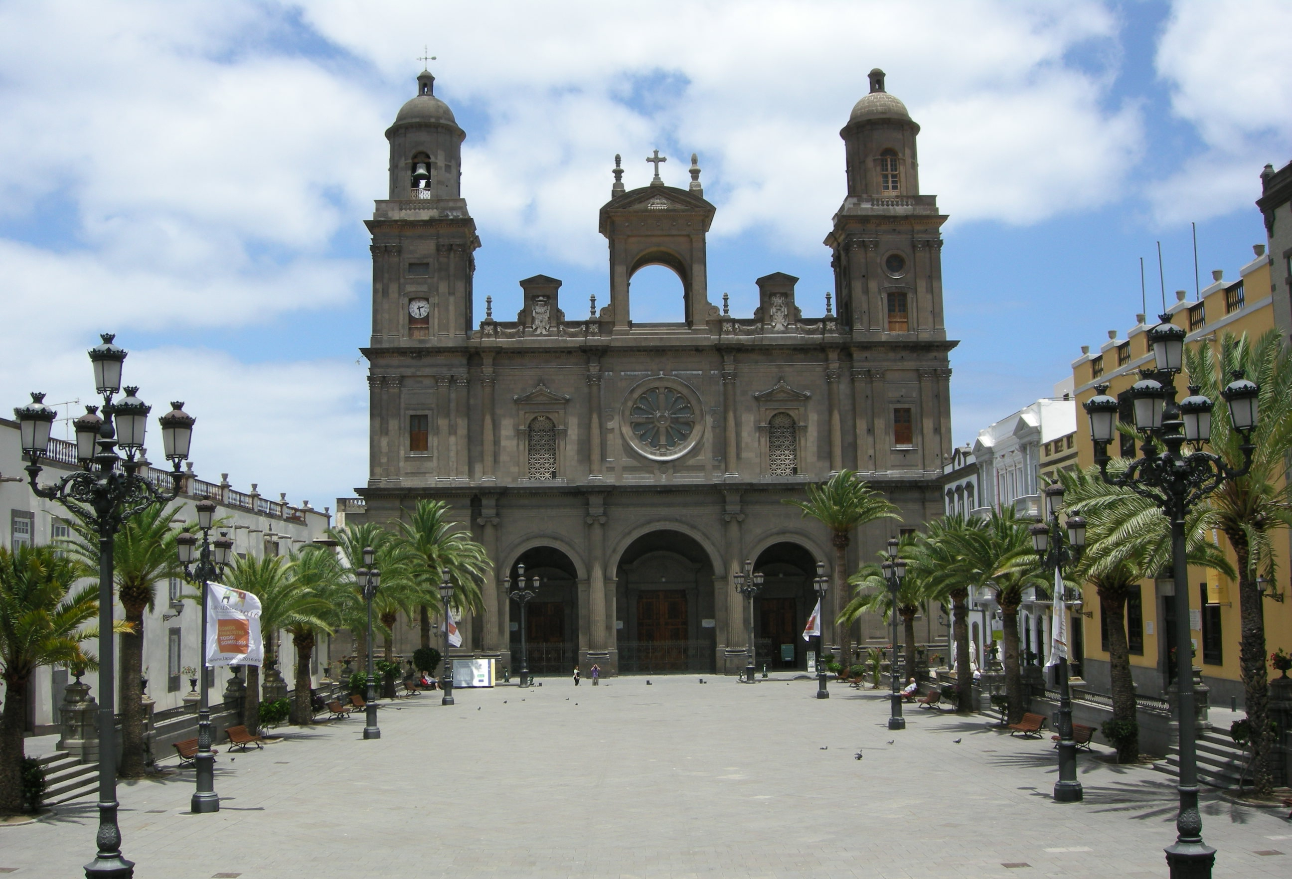 Catedral de santa ana